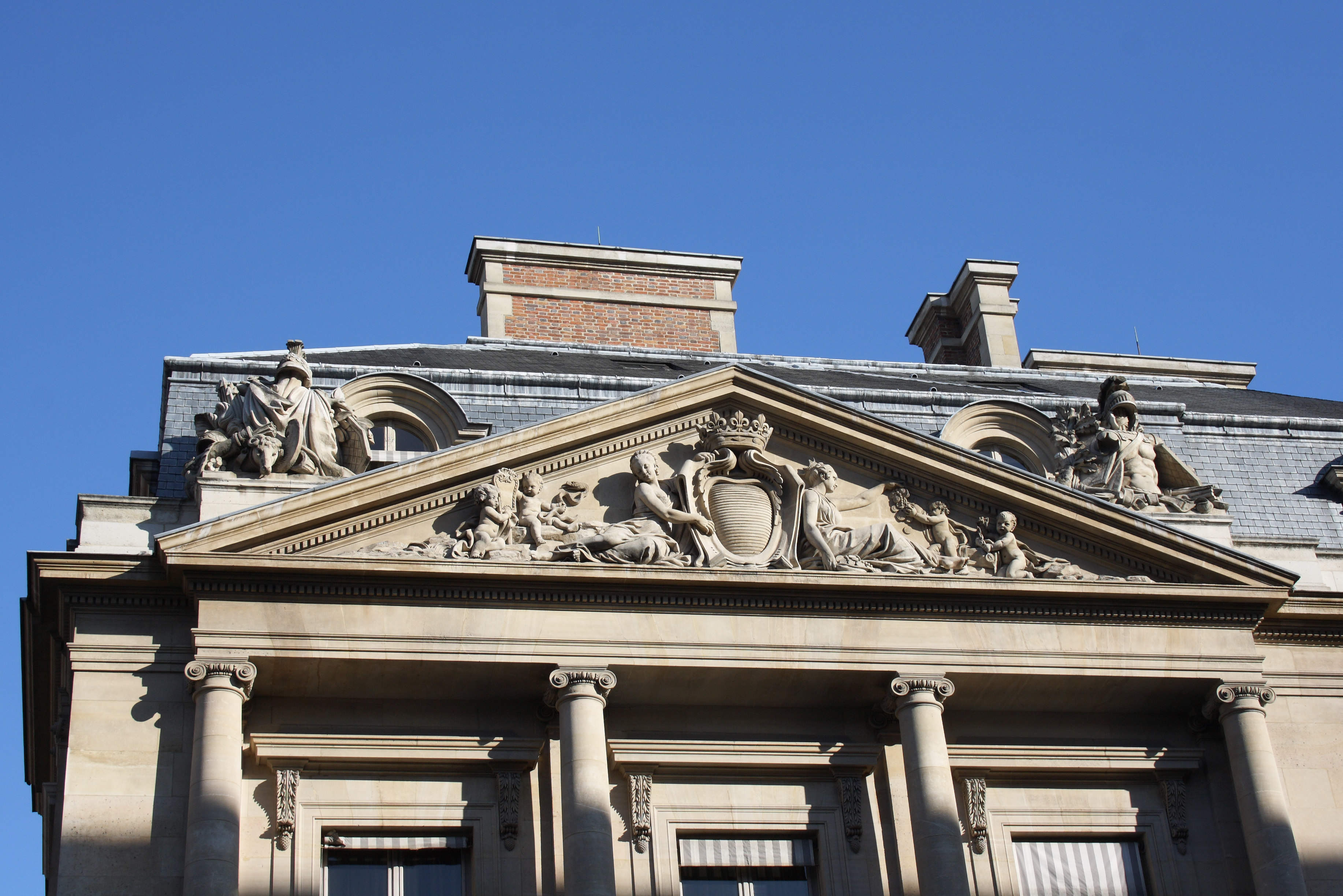 Sitz des Conseil d’État im Palais Royal im 1. Arrondissement in Paris (Île-de-France/Frankreich)